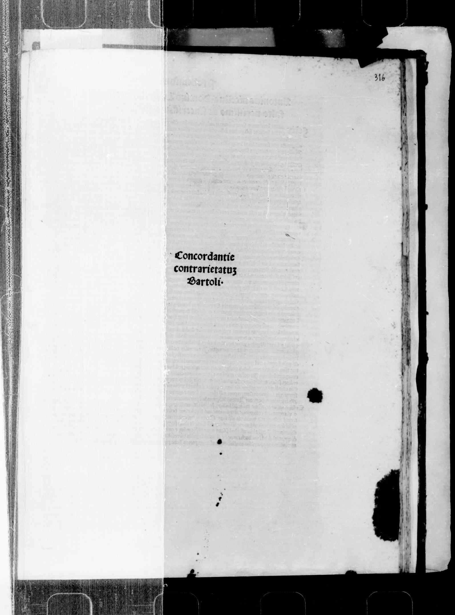 Frontespizio